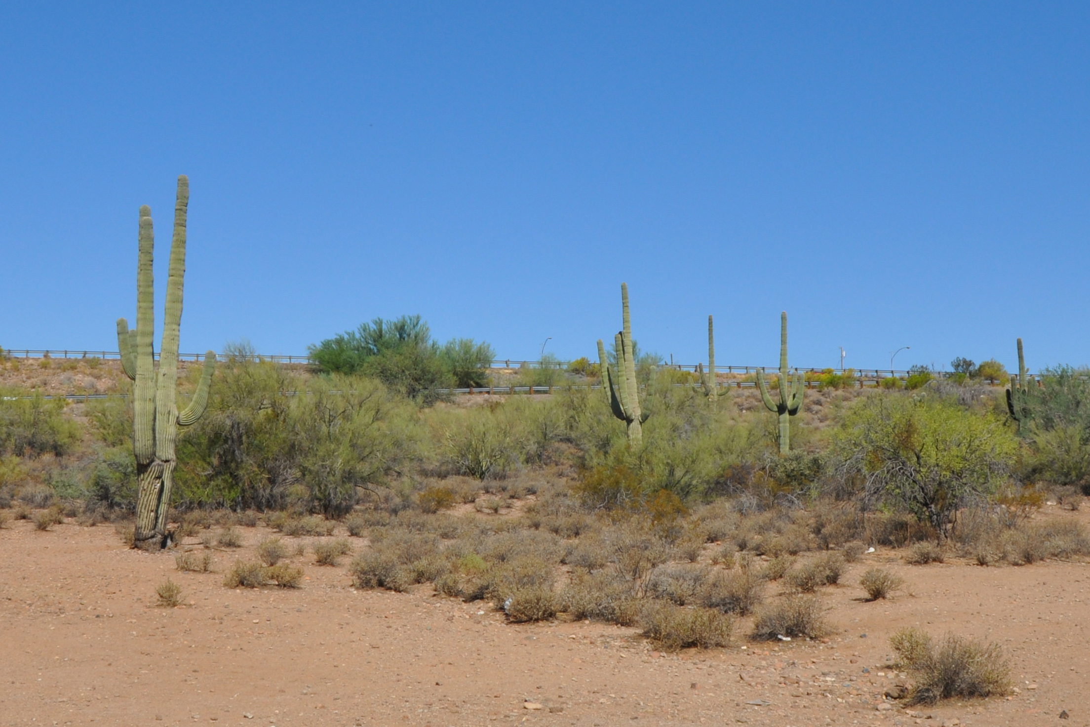 Diversi Saguaro nel deserto del Sonora.